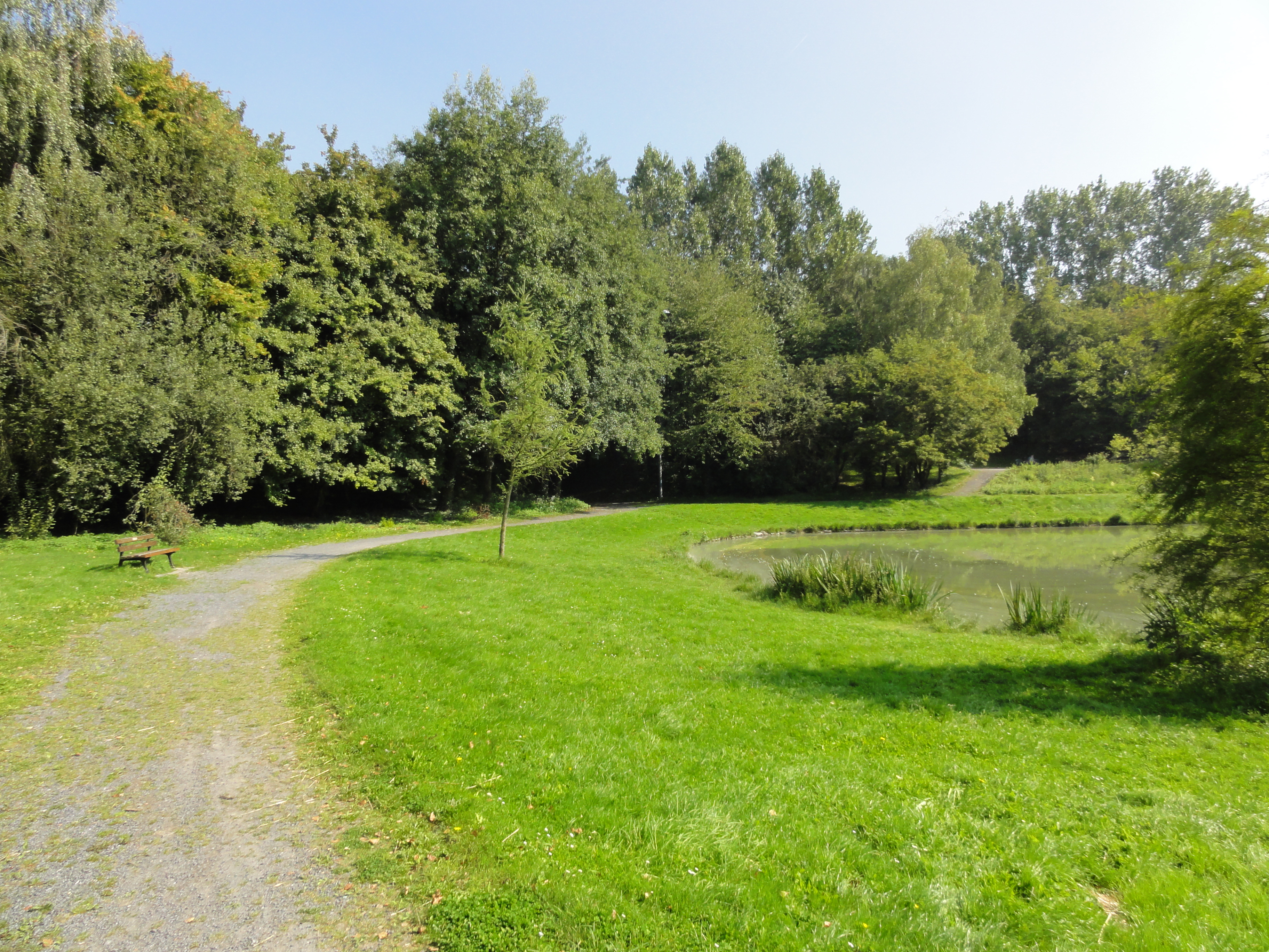 Terril n° 198 dit 1 de Crespin, Fosse n° 1 - 1 bis de la Compagnie des mines de Crespin, Quiévrechain, Nord, Nord-Pas-de-Calais, France.